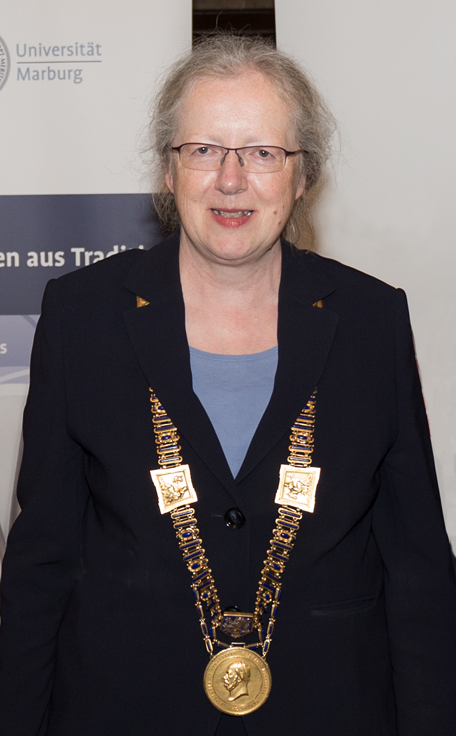 Katharina Krause, deutsche Kunsthistorikerin, Hochschullehrerin und Präsidentin der Philipps-Universität Marburg (seit 2010).